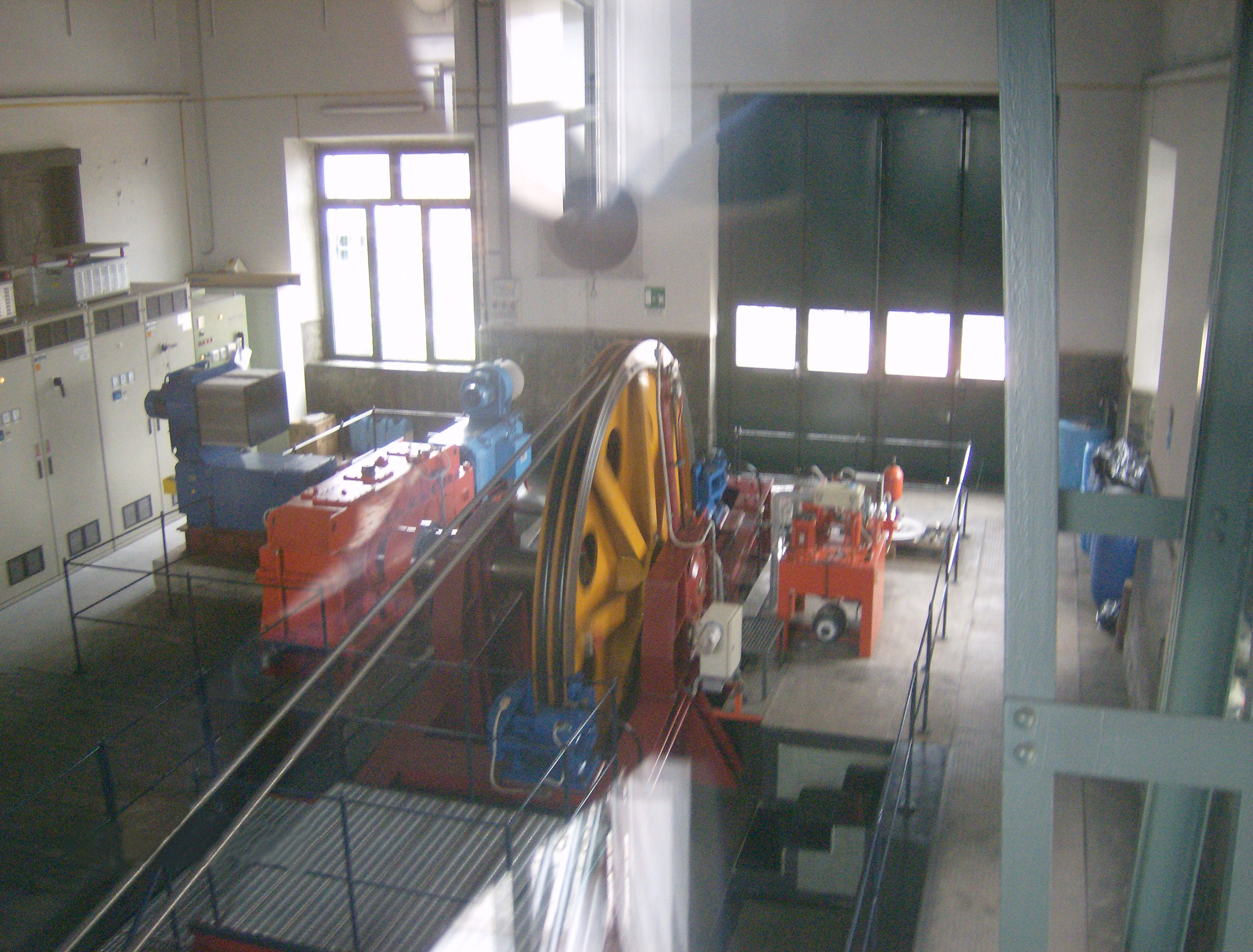 Sala macchine Funicolare